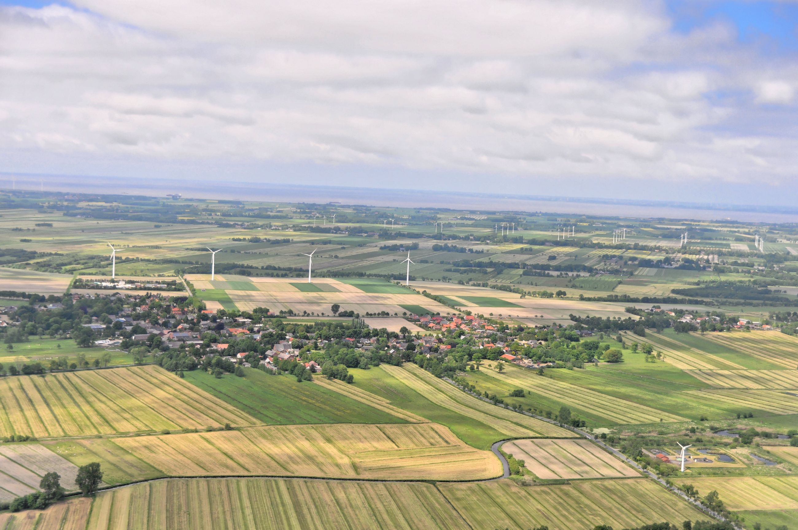 Überführungsflug vom Flugplatz Schwarzheide-Schipkau über Potsdam, Lüneburg zum Flugplatz Nordholz-Spieka